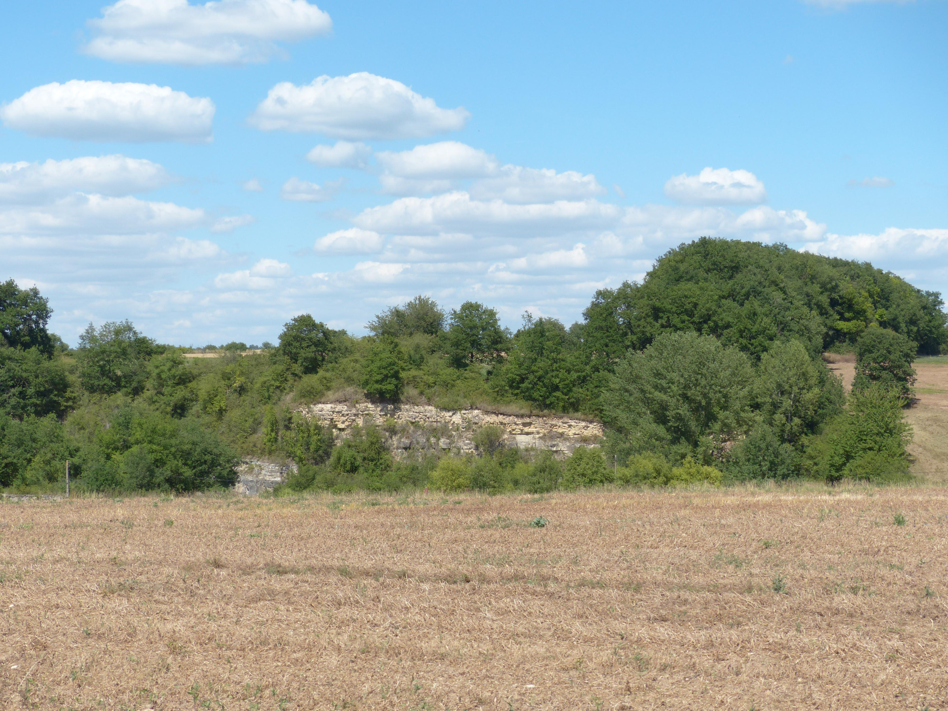 La Groutte (Cher). Carrière de pierre calcaire ouverte dans le flanc occidental de l'oppidum des Murettes. Vue depuis la D 139.